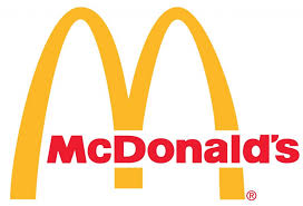 Mcdonalds